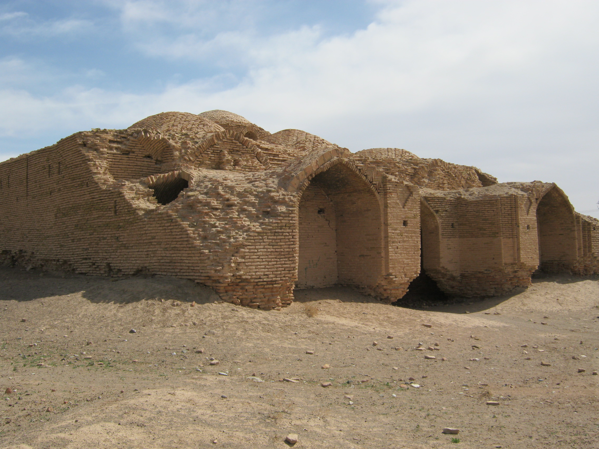 رباط زرنوخ